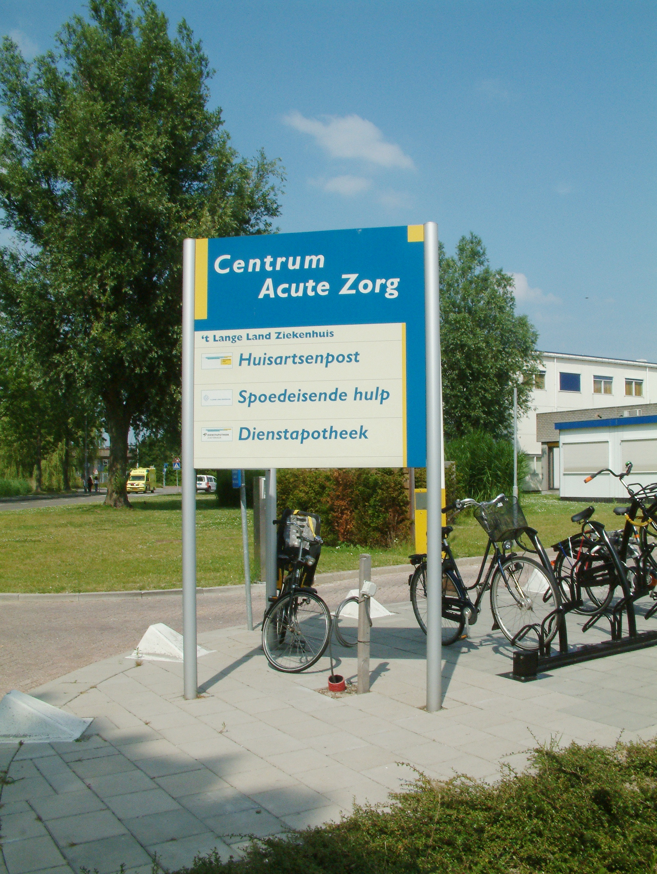 Bouwwerken in Zoetermeer